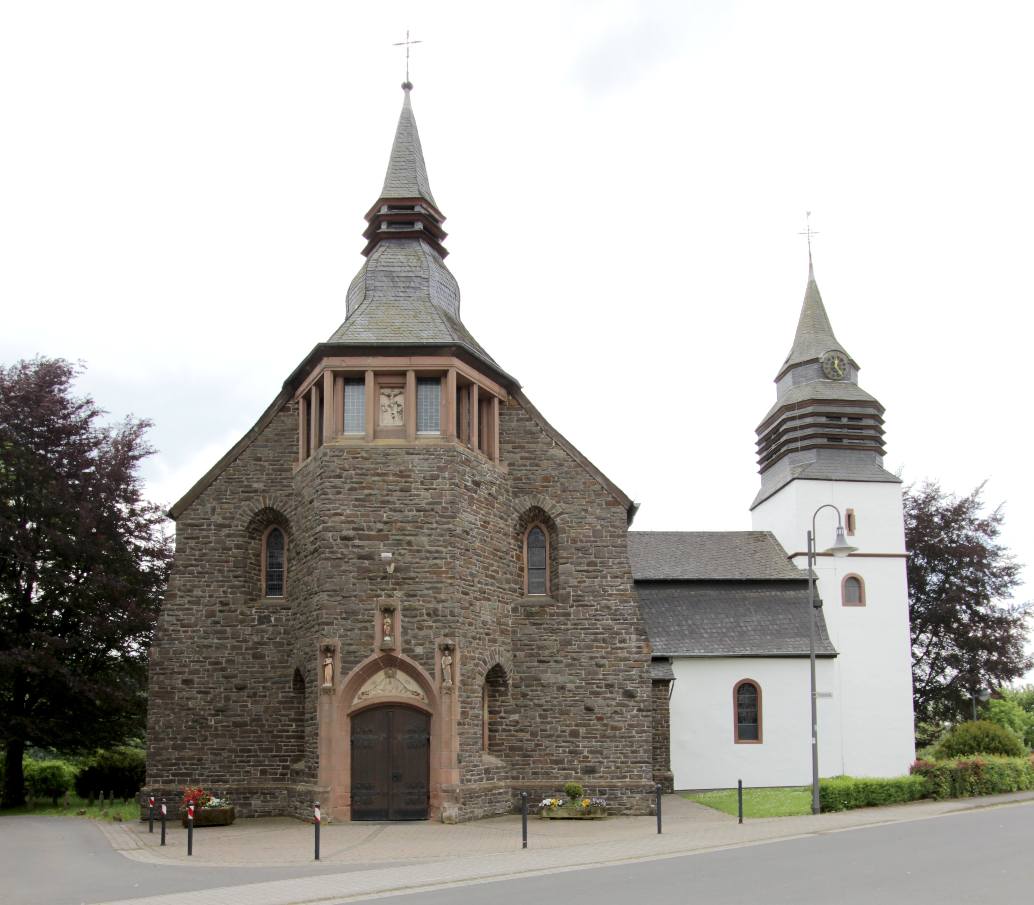 54687 Arzfeld, Schulstraße 1. Spätgotischer Bruchsteinbau aus dem 15. oder 16. Jahrhundert. Erweiterung durch Querbau und Aufstockung des Westturms, 1911, Architekt Peter Marx, Trier; mit Ausstattung; auf dem Kirchhof Denkmal für die Streiter des sogenannten Klöppelkriegs, Granitquaderwand, reliefierte Metallplatte, 1908; vor der Ostwand der Kirche Schiefer-Grabkreuze, 18. und 19. Jahrhundert. Aufnahme von 2018.